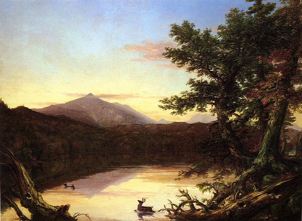 Schroon Lake